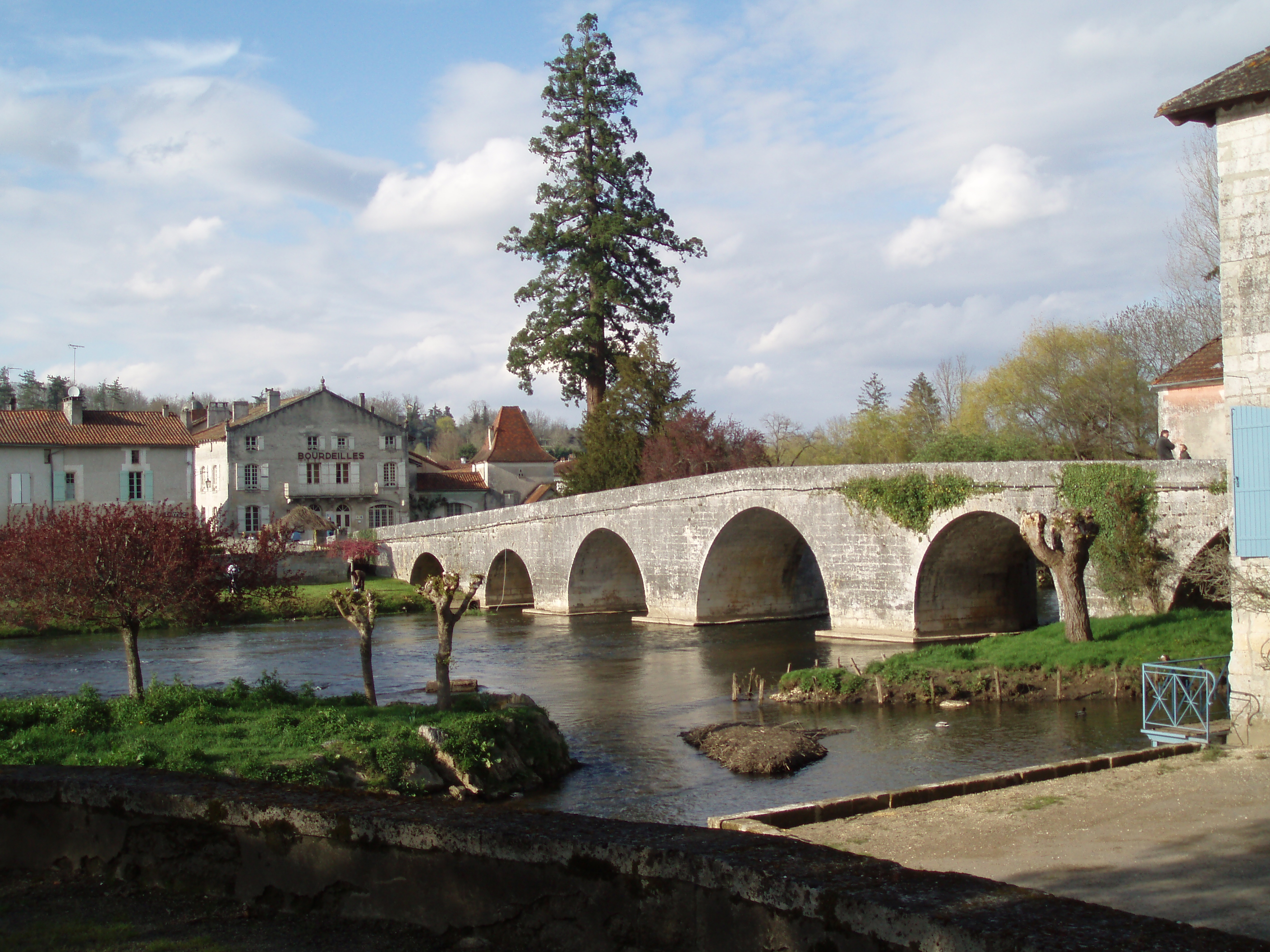 Bourdeilles en Dordogne